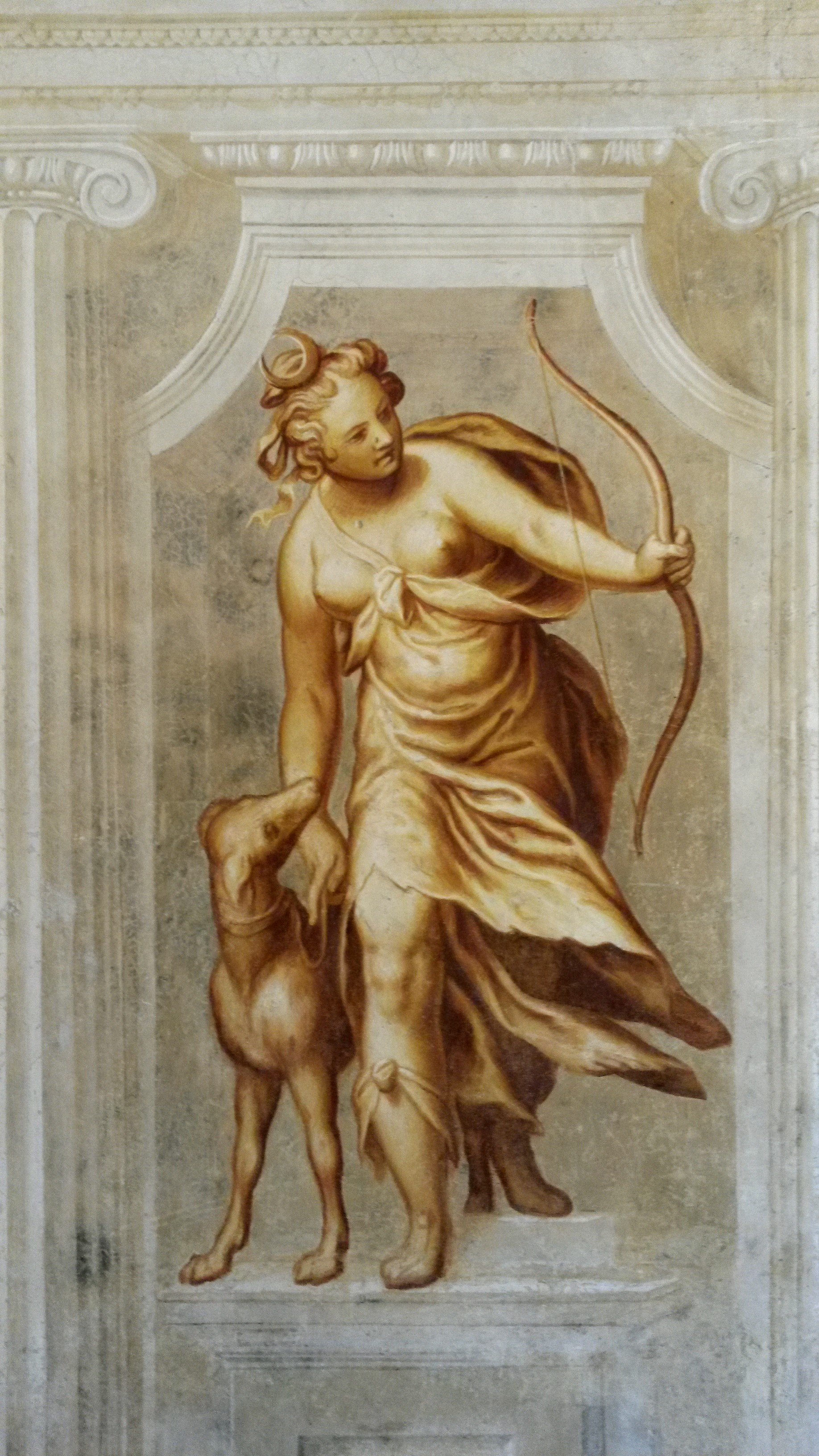 Paolo Farinati, Diana, 1590 circa, affresco (restaurato nel 2016). Diana rappresenta la natura selvatica; sulla parete opposta, Cerere rappresenta la natura coltivata.